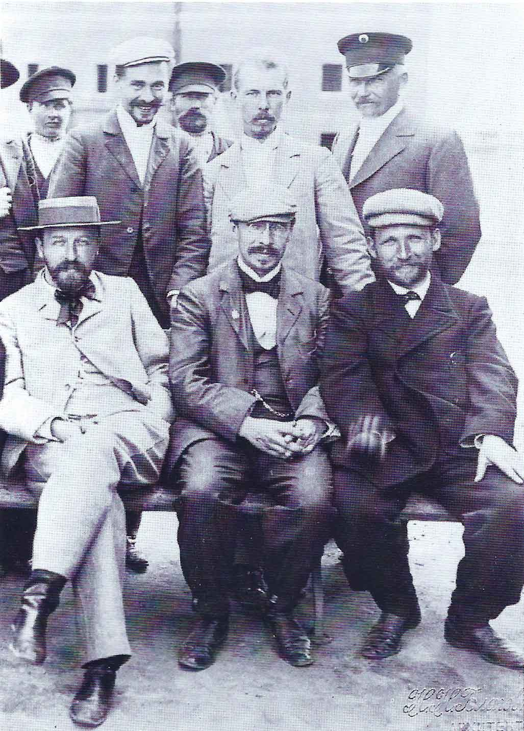 С. У. Соловьев (слева) с коллегами Н. Н. Благовещенским (в сидит центре) и Д. П. Суховым (сидит справа)